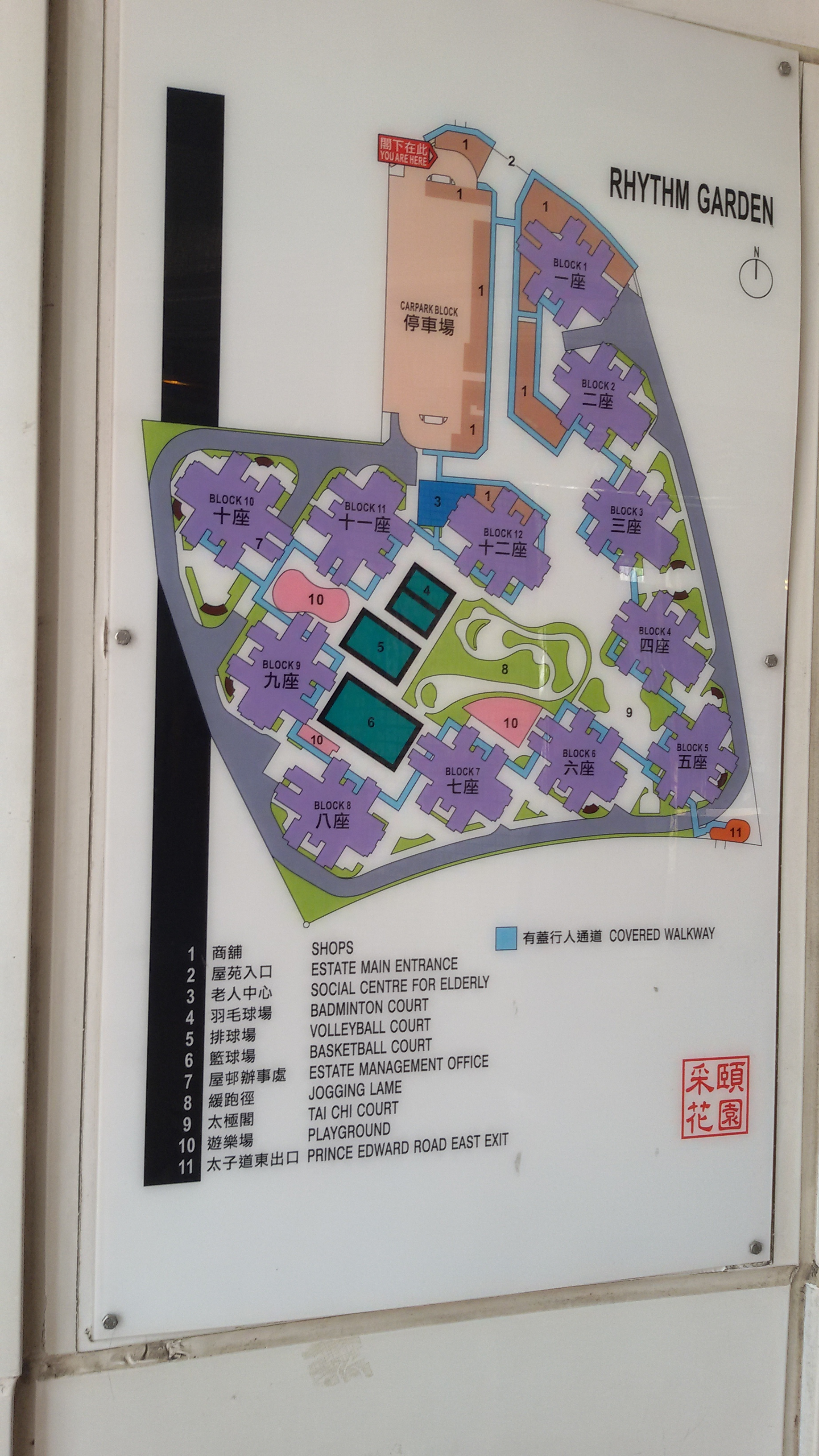 中文（香港）: 采頤花園位置圖